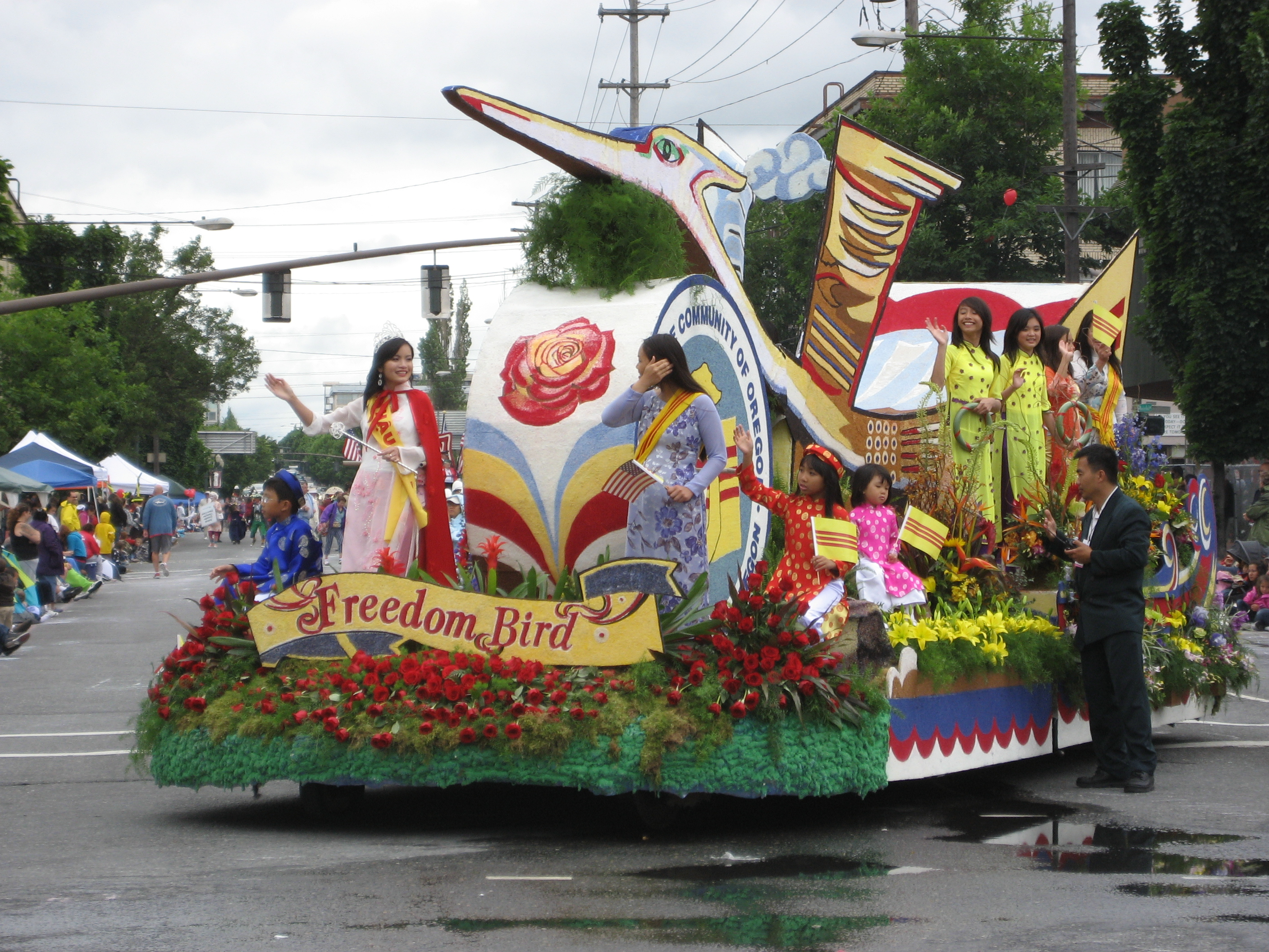 Lễ hoa hồng Portland June 06, 2009 - Đứng trên xe hoa là hoa hậu cộng đồng Việt Nam tết 2009 (bên trái phía trước).